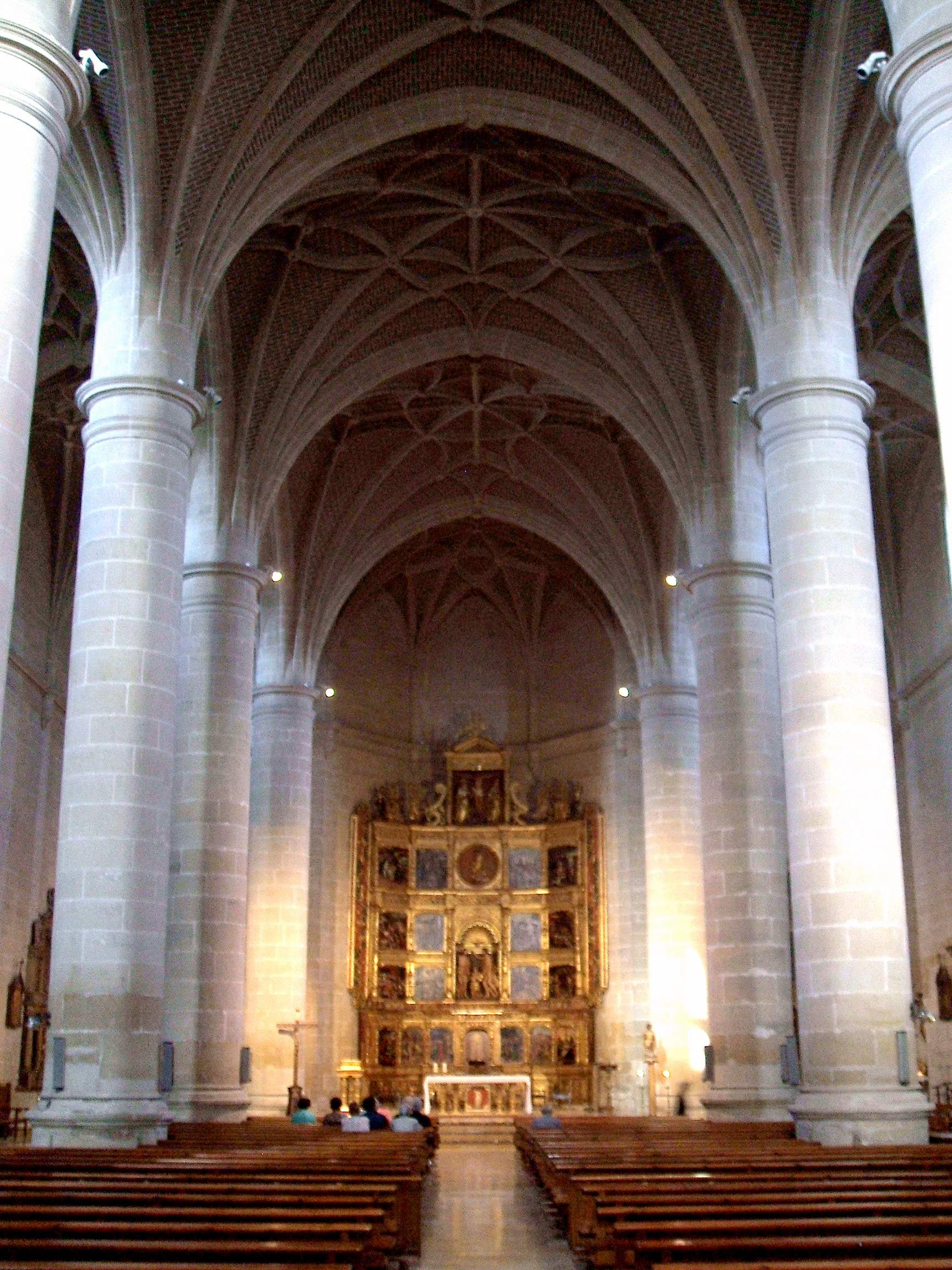 Iglesia de San Juan Bautista (Cintruénigo, Navarra)